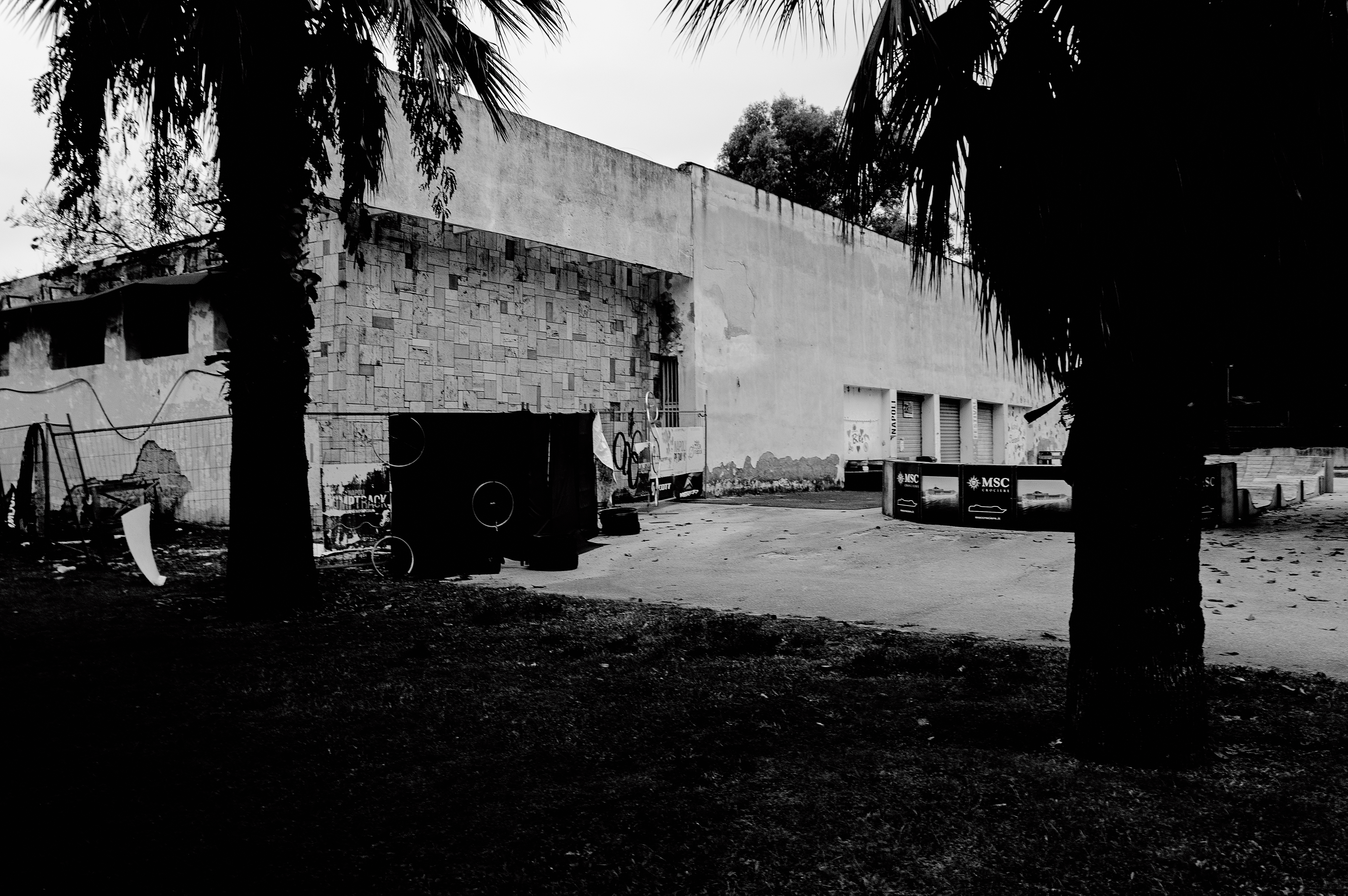 Prospetto